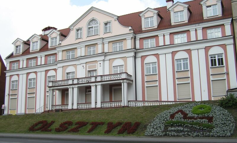 Olsztyn, ul. Pieniężnego 22 - Dom Towarzyski Kopernik (zabytek nr A-2938 z dn. 8.11.1989)